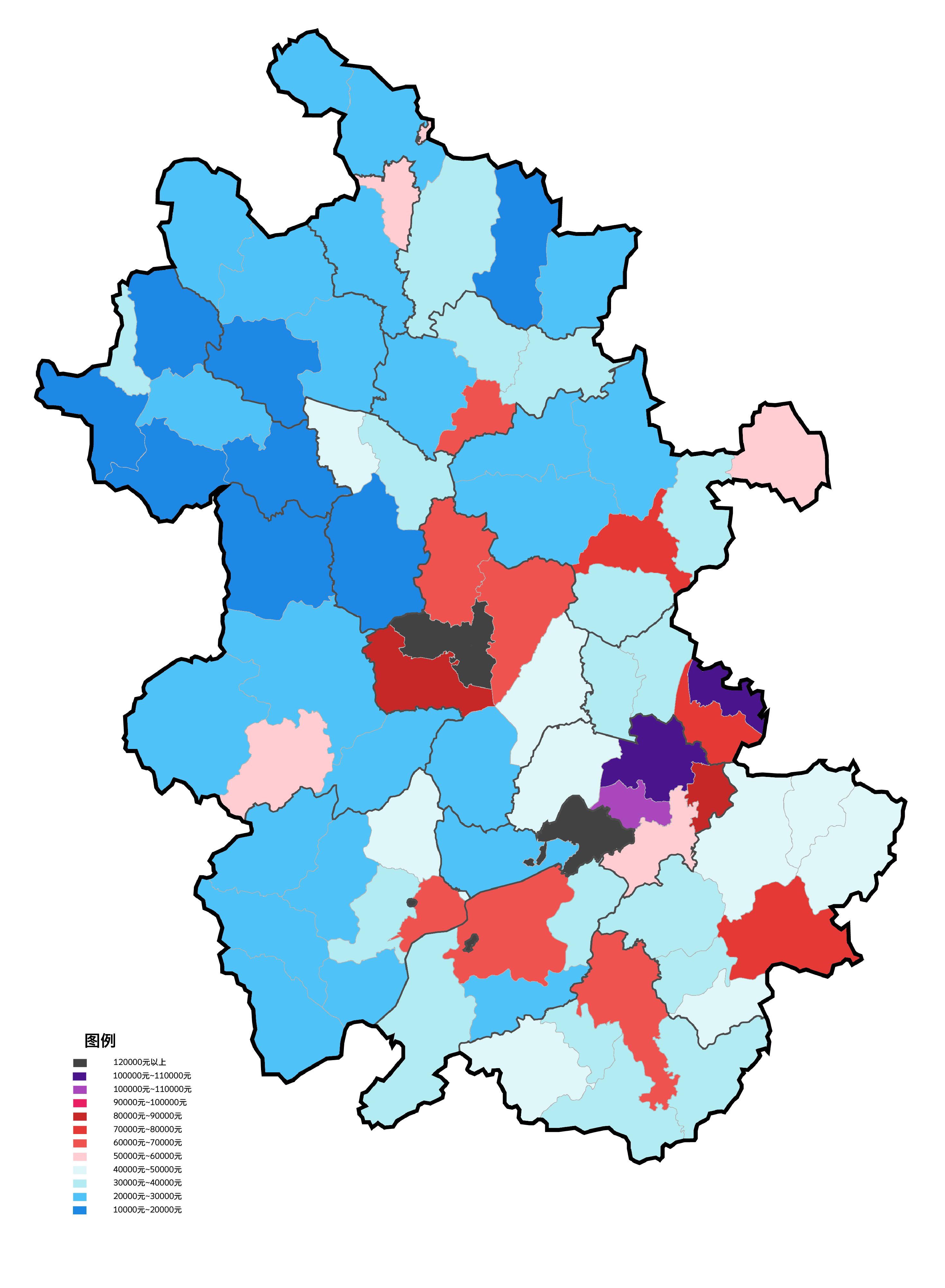 安徽省县市根据2017年人均地区生产总值填色地图